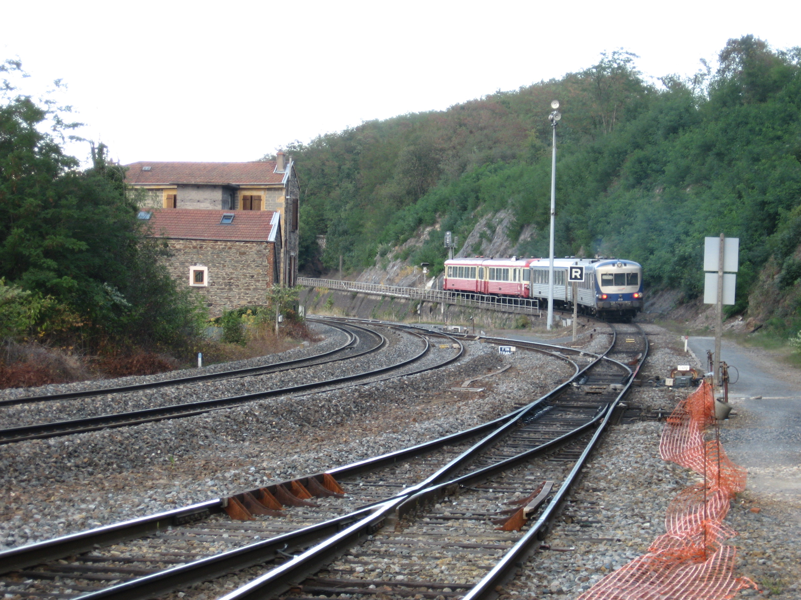 L'Arbresle station in 2009